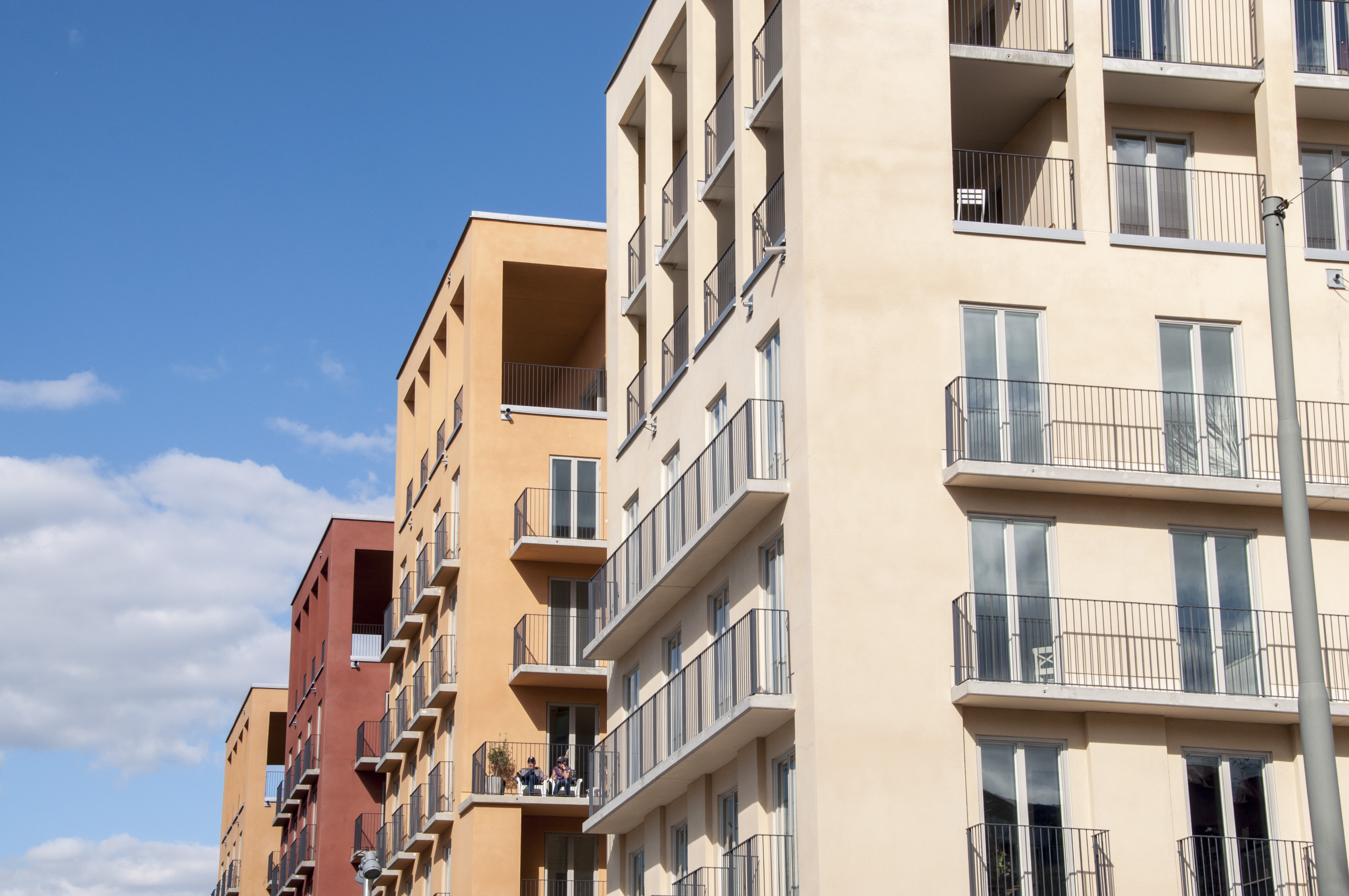 Svea Fanfar, Melodislingan (Valhallavägen/Lidingövägen) Stockholm Byggnadsår 2013-15 Byggherre: Etapp 1: Veidekke Bostad AB, Panorama och CA Fastigheter Arkitekt: Brunnberg & Forshed Ägare: BRF Svea Fanfar